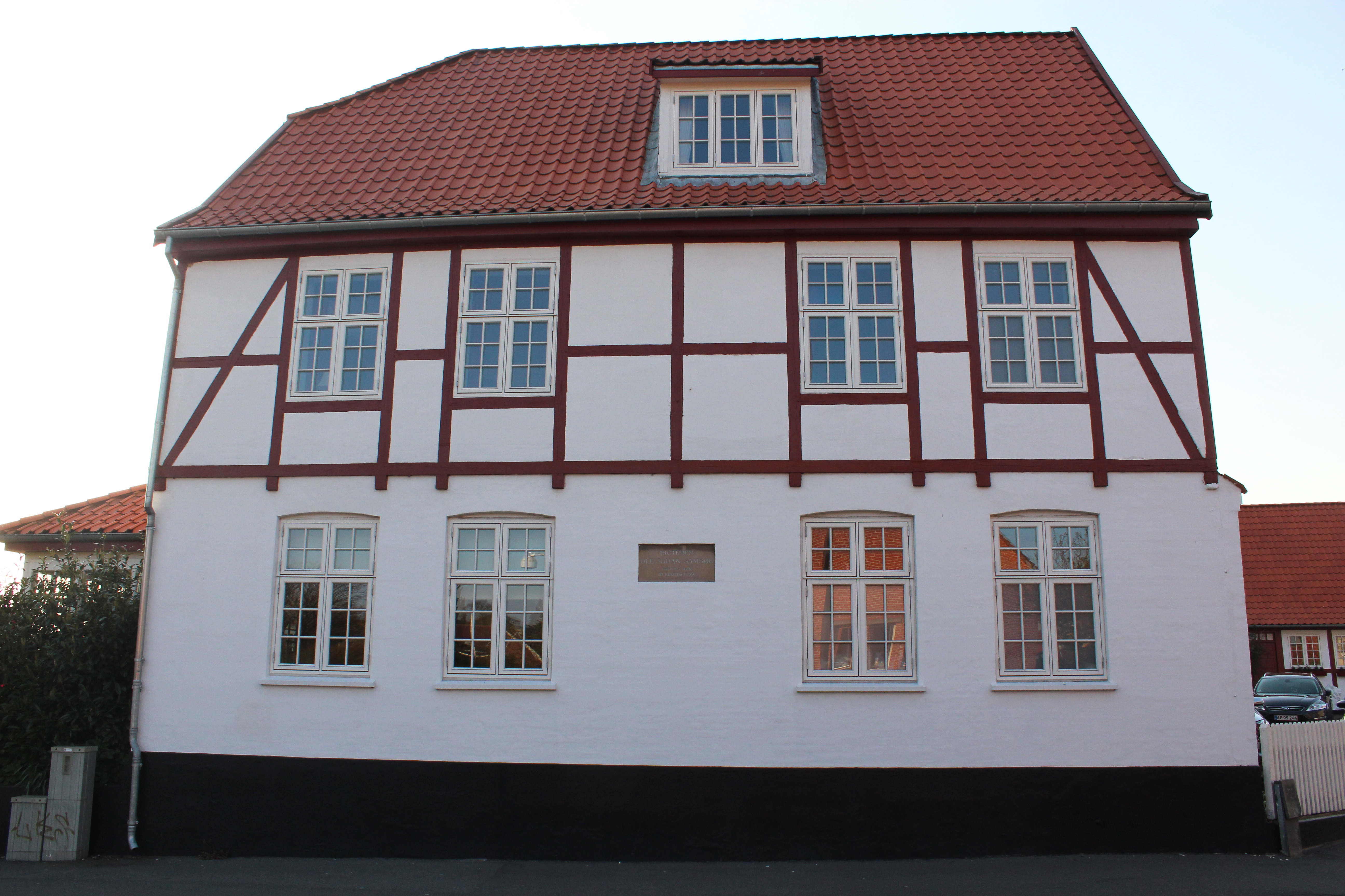 Hotel Kirstine ud mod Slagkildevej. Mindepladen skriver "Digteren Ole Johan Samsøe fødtes her 21. marts 17599".